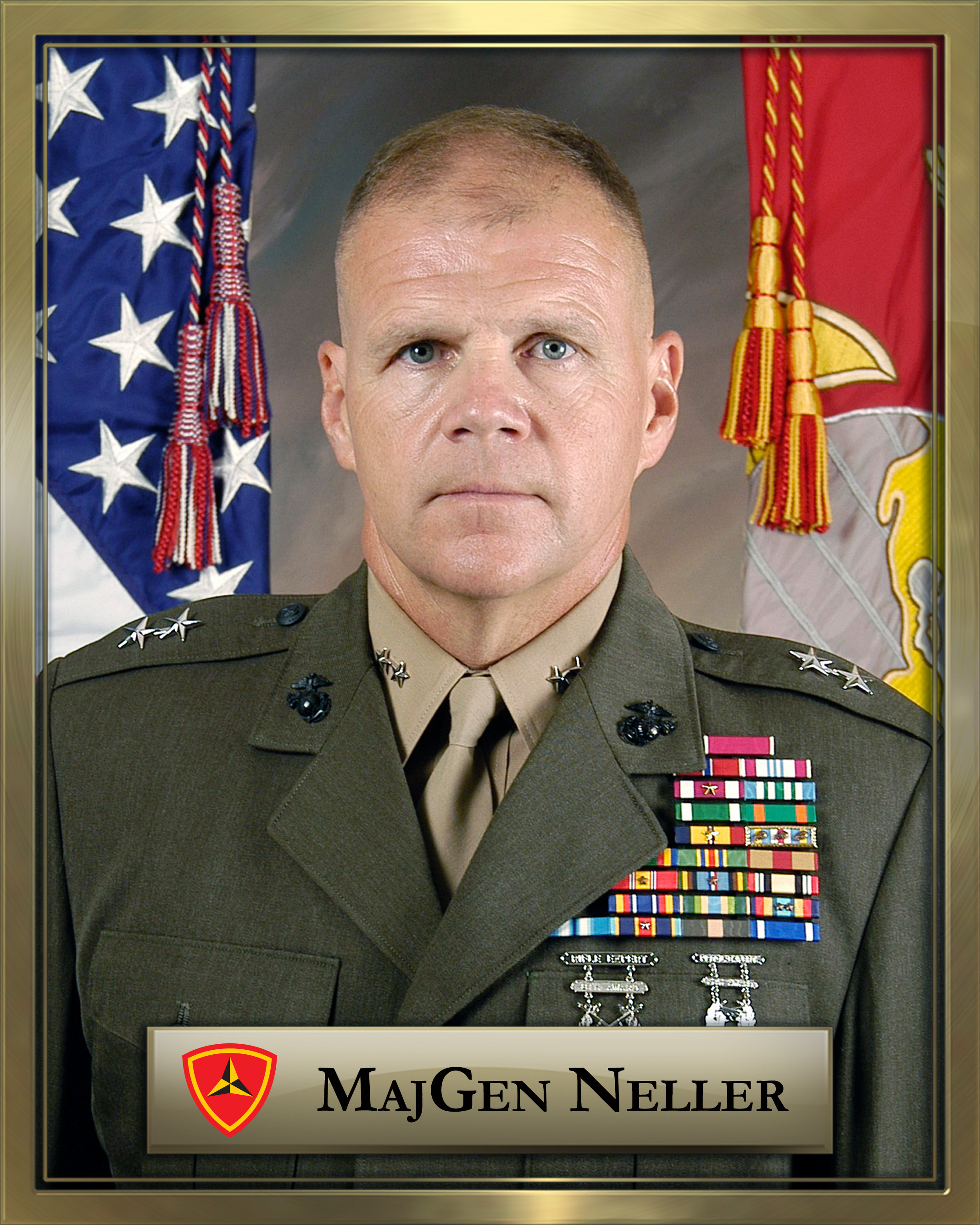 Major General Robert B. Neller, Commanding General, 3d Marine Division